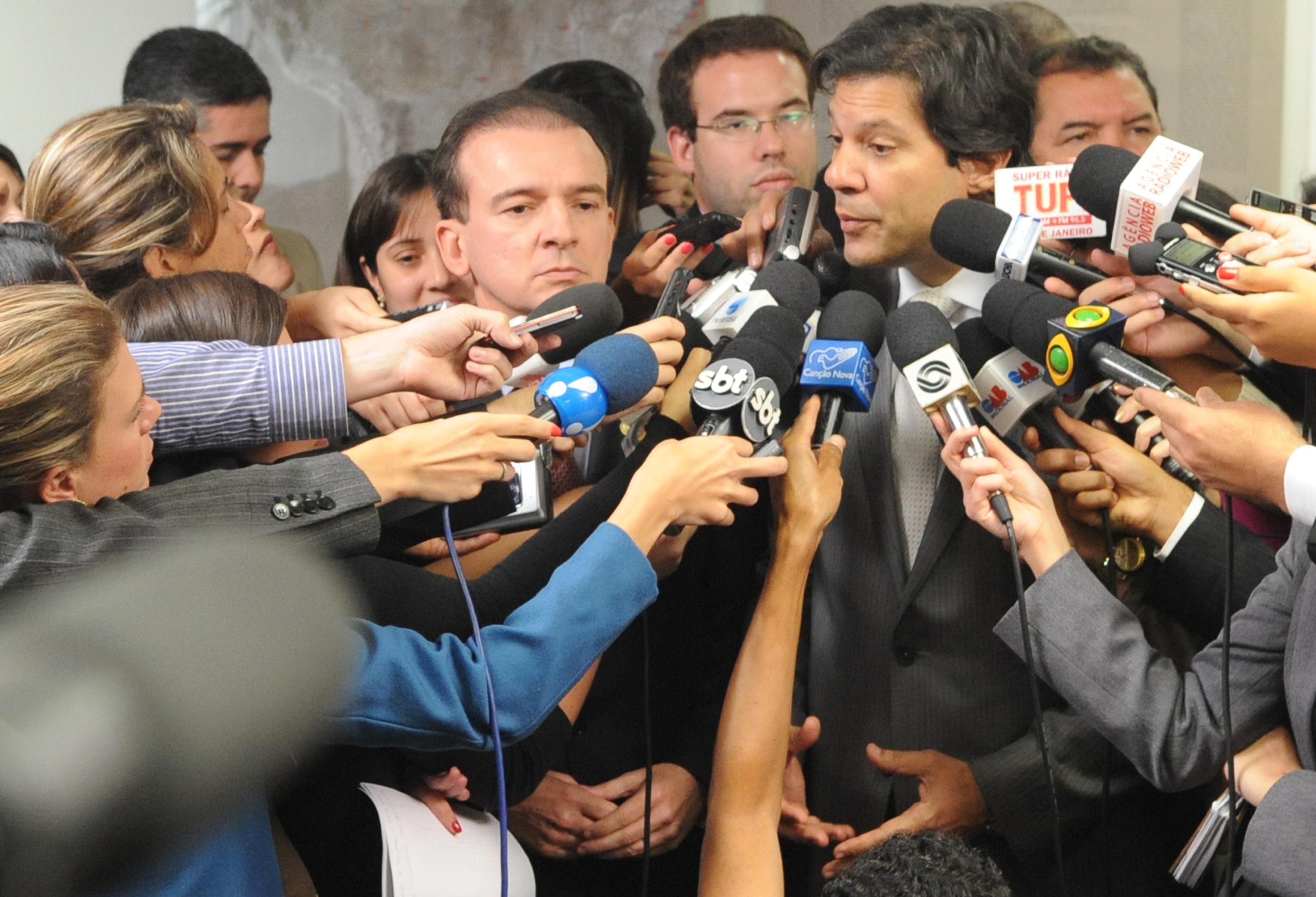 Brasília – O ministro da Educação, Fernando Haddad encontra-se com o presidente da Ordem dos Advogados do Brasil (OAB), Ophir Cavalcante para dar explicacoes sobre a falha no Enem (Wilson Dias/ABr)